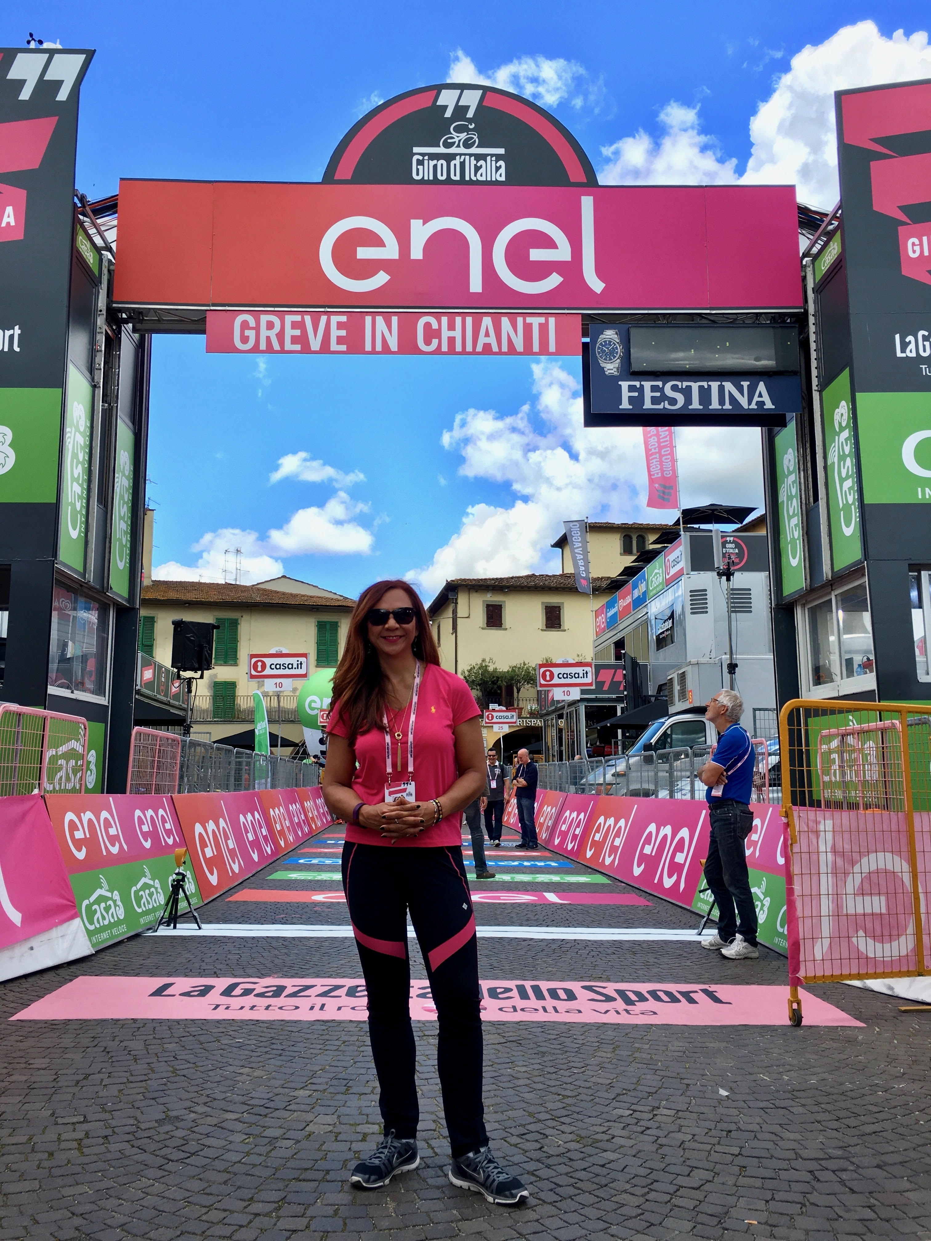 Georgina Ruiz Sandoval ha cubierto varias carreras del World Tour incluido el Giro de Italia